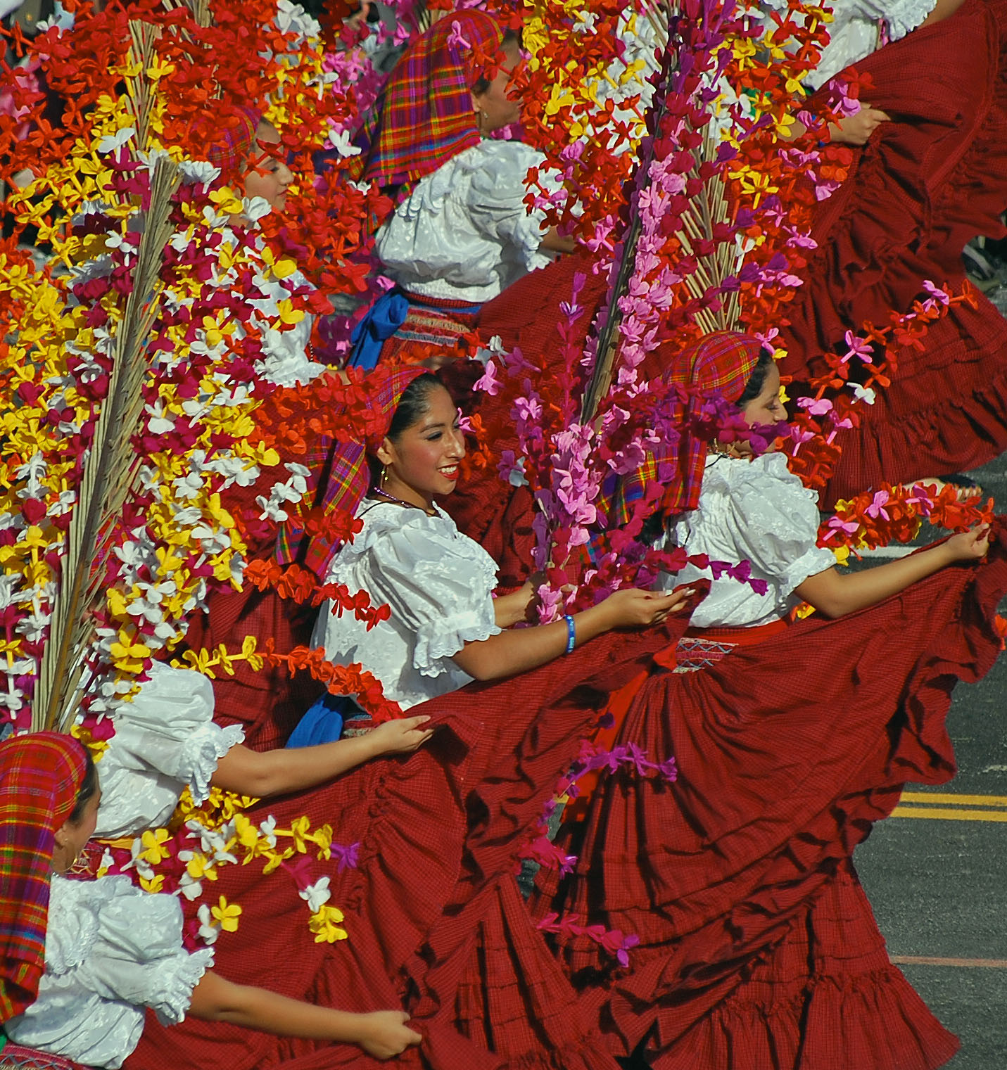 Tournament of Roses, Nuestros Angeles de El Salvador dancers from San Salvador, El SalvadorThe dancers followed the marching bandNuestros Angeles de El Salvador dancers